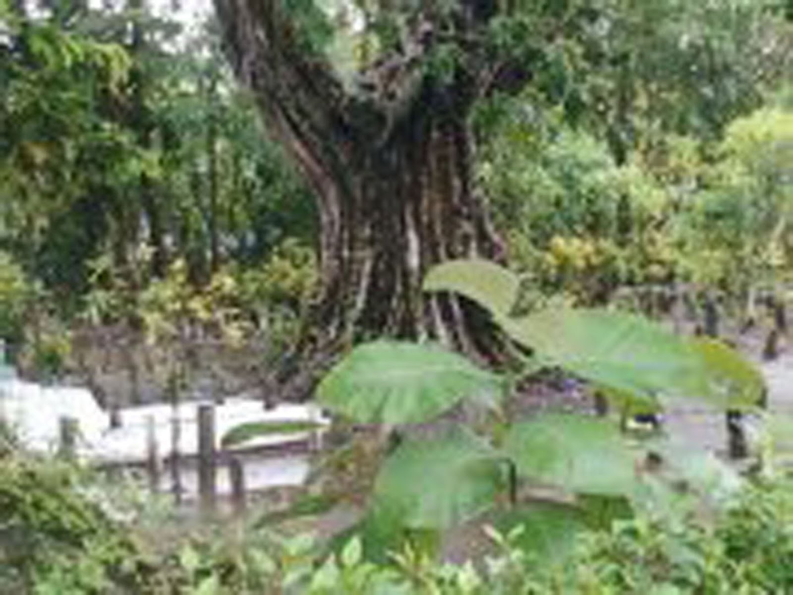 Dimakam ini tokoh pendiri Desa Limbangan dimakamkan